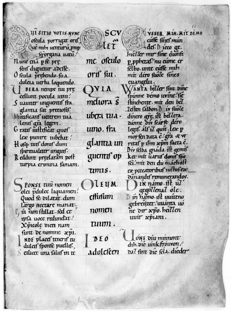 Erste Seite der Hoheslied-Expositio des Williram von Ebersberg BSB München, cgm 10, f. 10r (2. Hälfte 11. Jahrhundert)